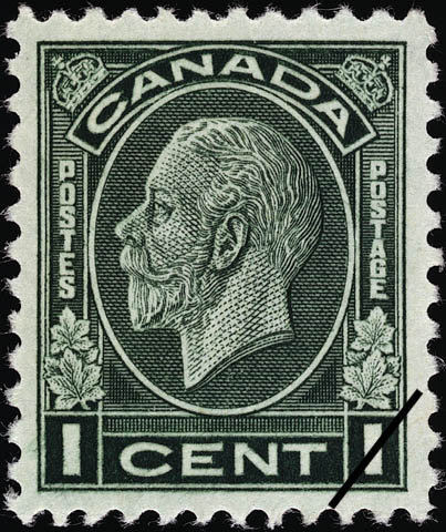 Timbre-poste du Canada 1 cent George V 1932